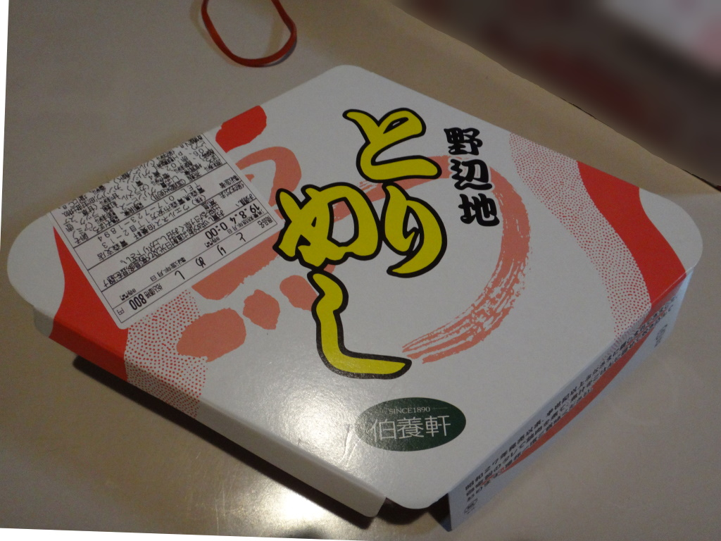 野辺地とりめし（野辺地駅の駅弁）の蓋